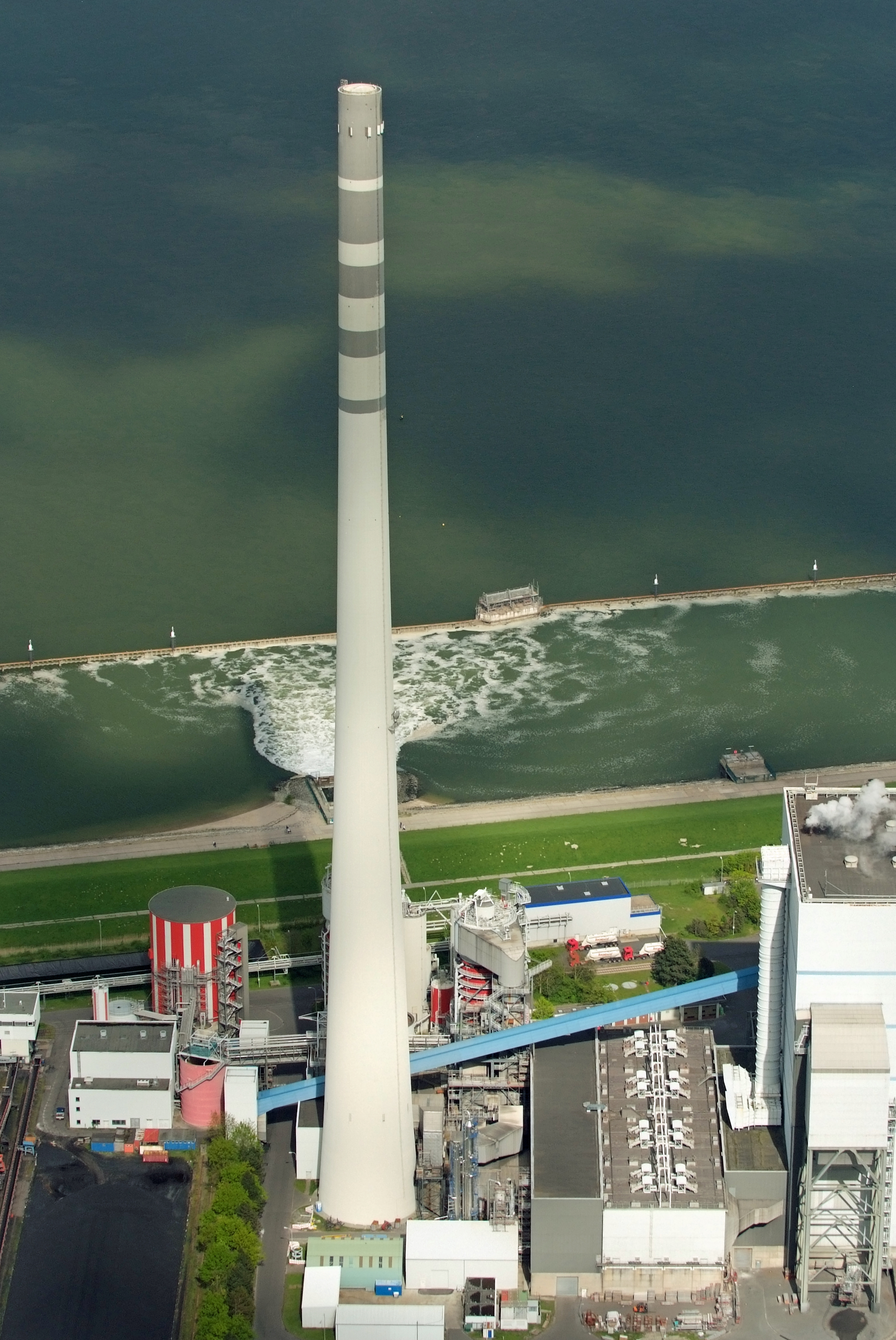 Eon Kraftwerk Wilhelmshaven, Fotoflug vom Flugplatz Nordholz-Spieka über Bremerhaven, Wilhelmshaven und die Ostfriesischen Inseln bis Borkum